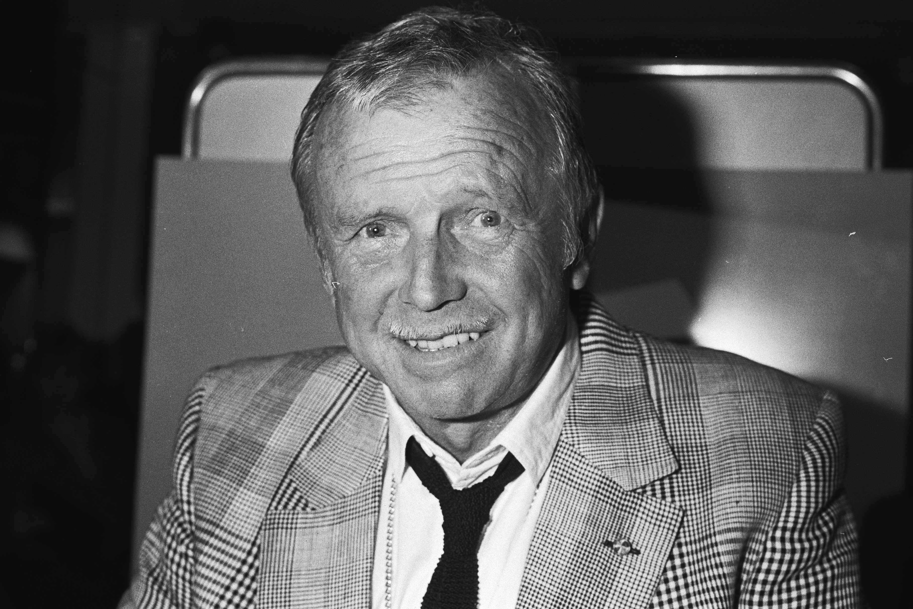 Collectie / Archief : Fotocollectie Anefo Reportage / Serie : Toon Hermans in de Bijenkorf in Amsterdam ter gelegenheid van het 100.000e exemplaar van zijn boek Beschrijving : cabaretiers, portretten, boeken, schrijvers Datum : 24 maart 1983 Locatie : Amsterdam, Noord-Holland Trefwoorden : boeken, cabaretiers, portretten, schrijvers Persoonsnaam : Hermans, Toon Fotograaf : Croes, Rob C. / Anefo Auteursrechthebbende : Nationaal Archief Materiaalsoort : Negatief (zwart/wit) Nummer archiefinventaris : bekijk toegang 2.24.01.05 Bestanddeelnummer : 932-5439